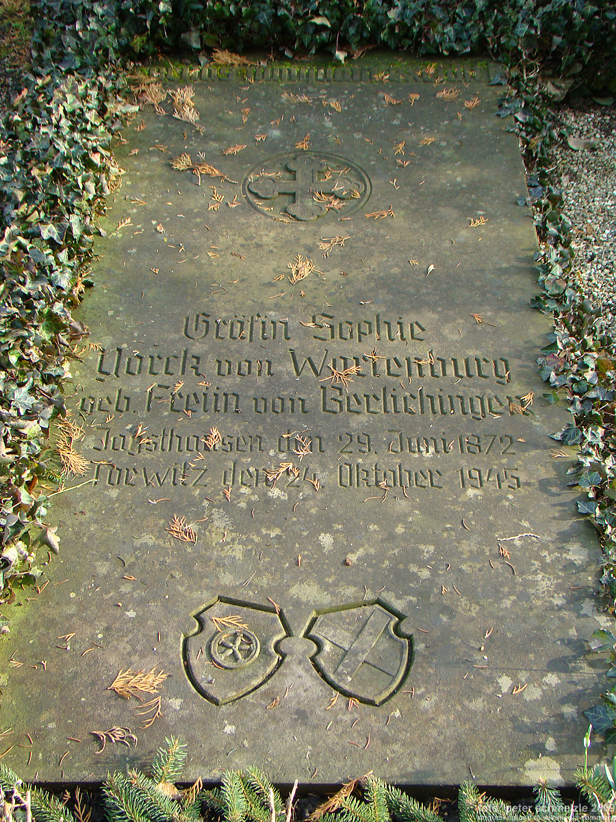 Grabstein in der Berlichingen-Grablege auf dem Friedhof in Jagsthausen, Gräfin Sophie Yorck von Wartenburg, geb. von Berlichingen (1872-1945)